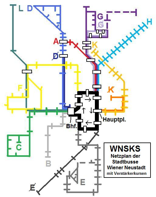 Netzplan WNSKS mit Verstärkerkurse